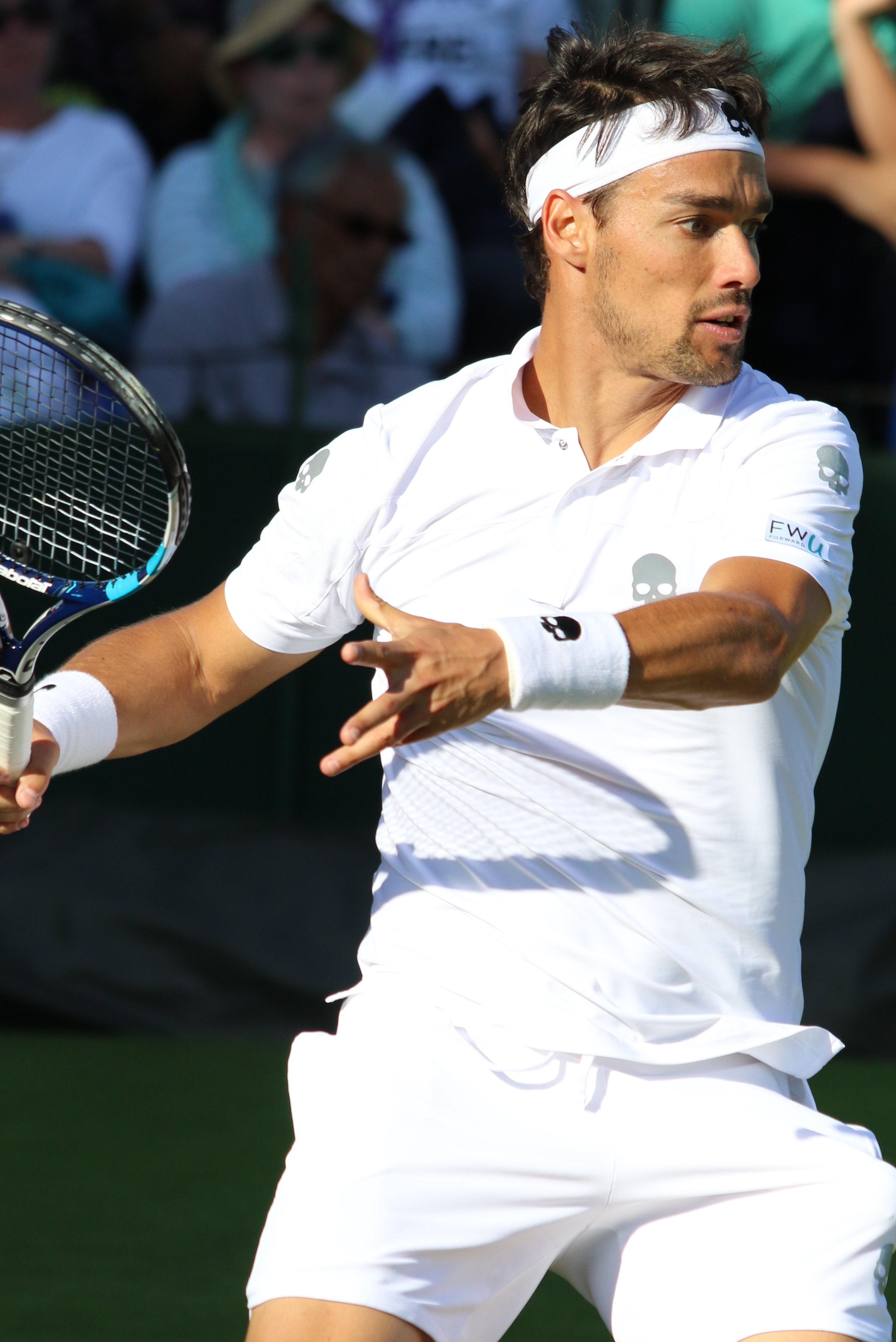 Fognini WM17 (17)